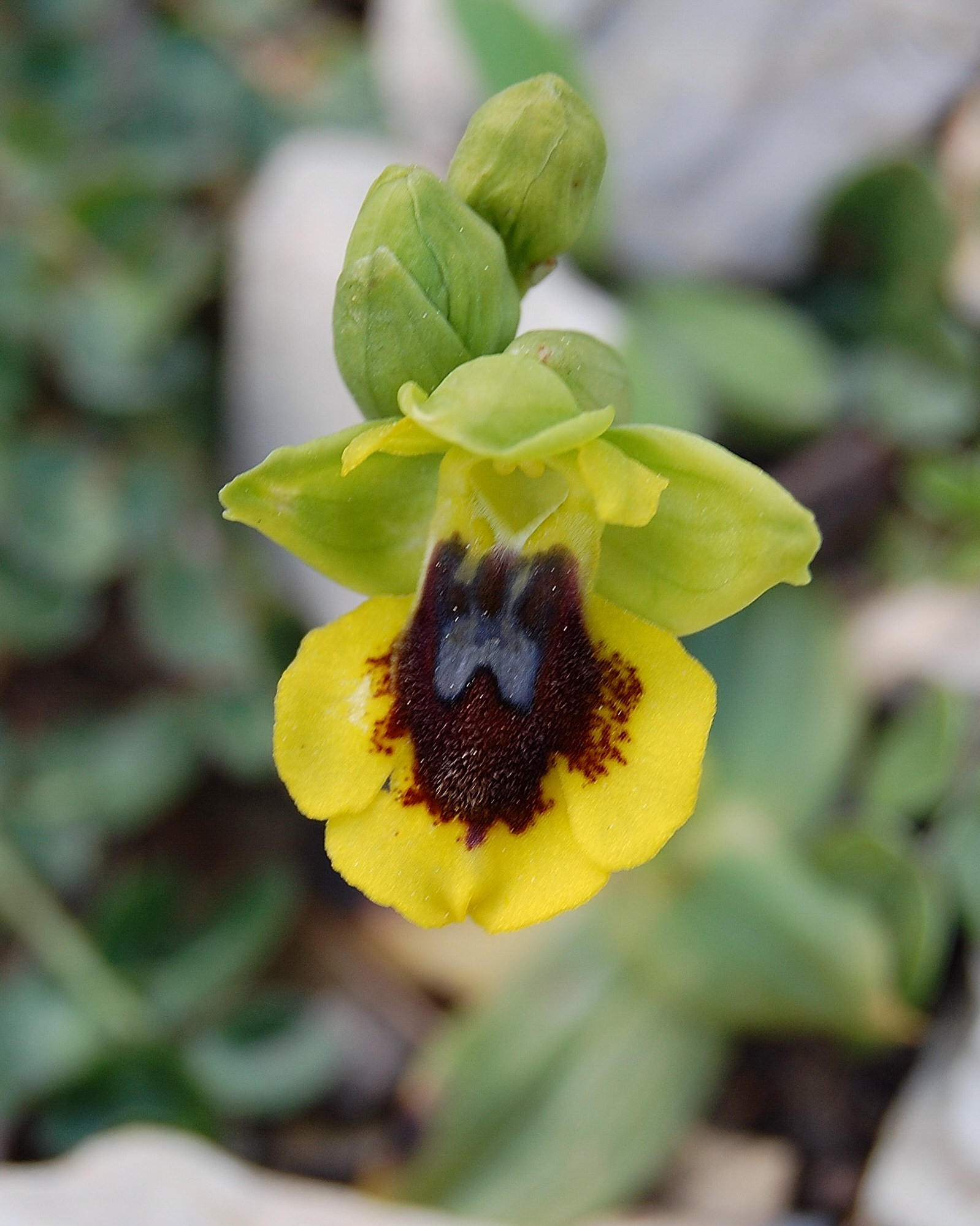 Ophrys lutea Riserva naturale dello Zingaro